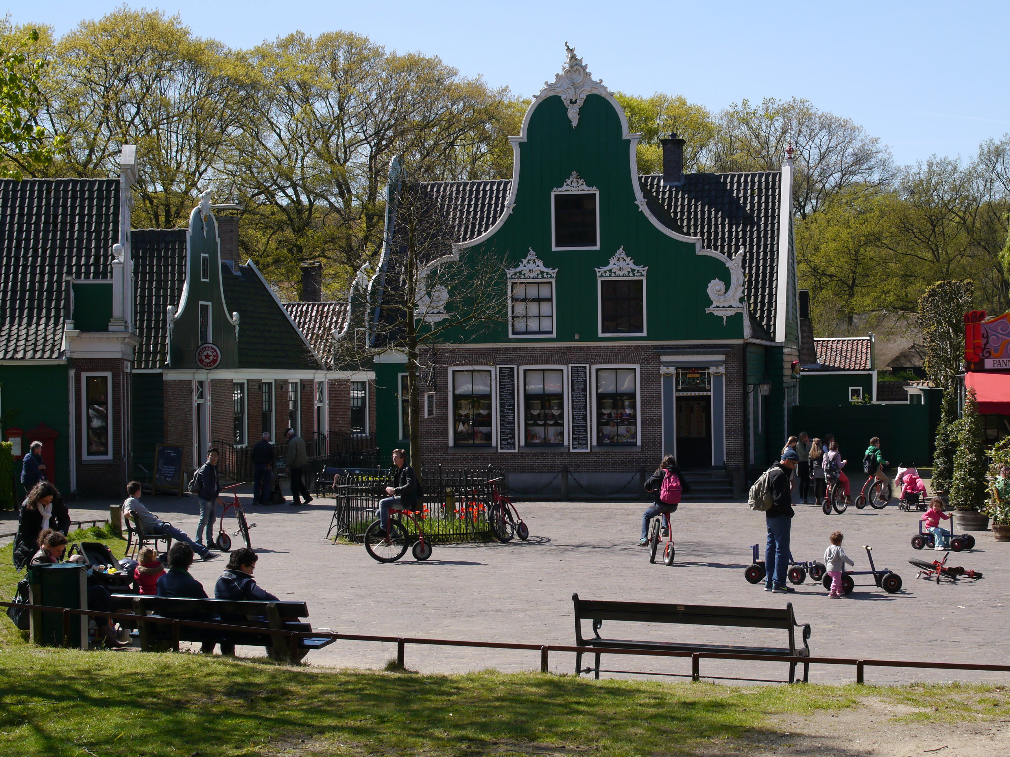 (33) Winkel Zus en Jet, krommenie - Openluchtmuseum Arnhem